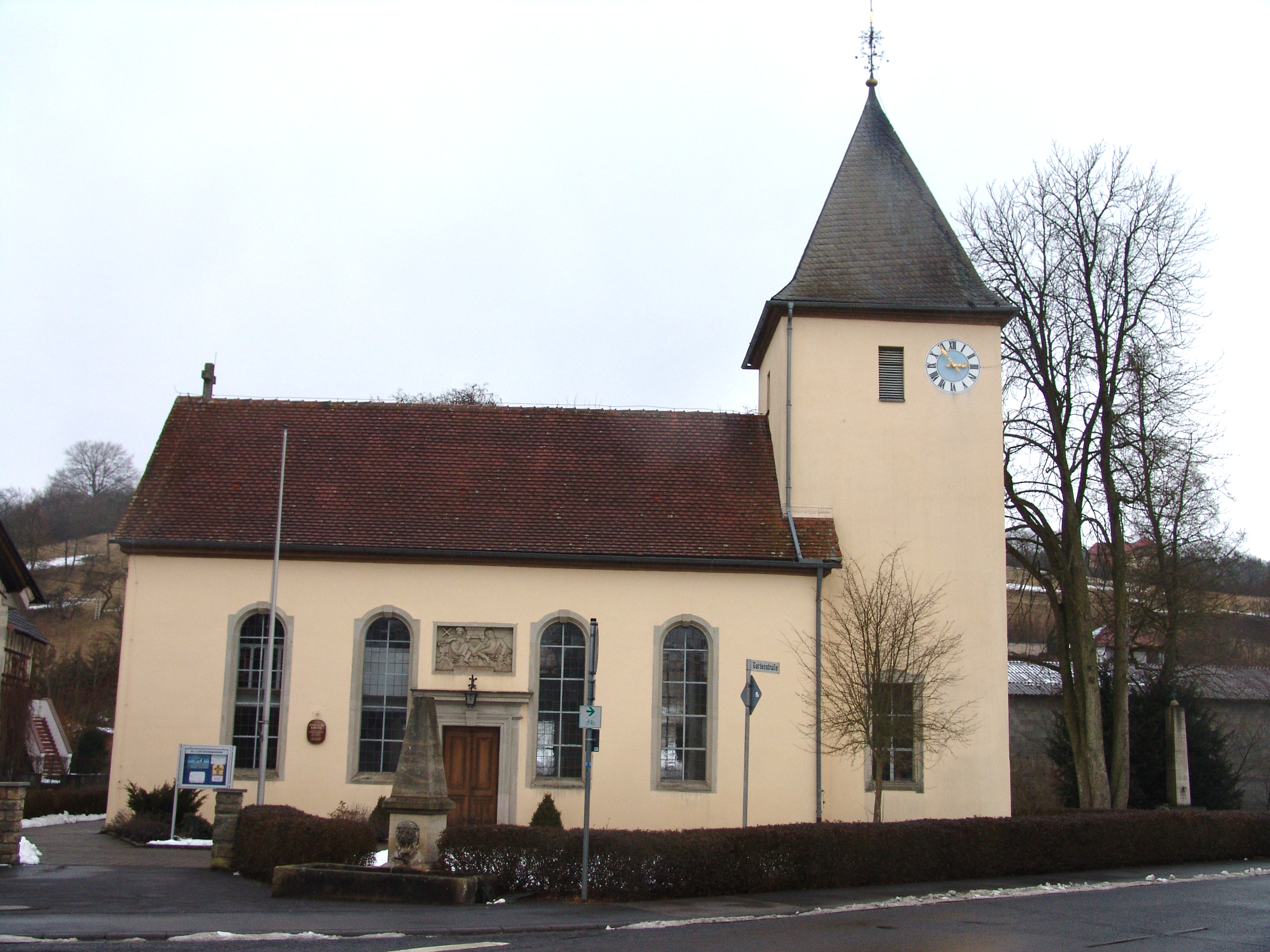 Kirche in Ditterswind